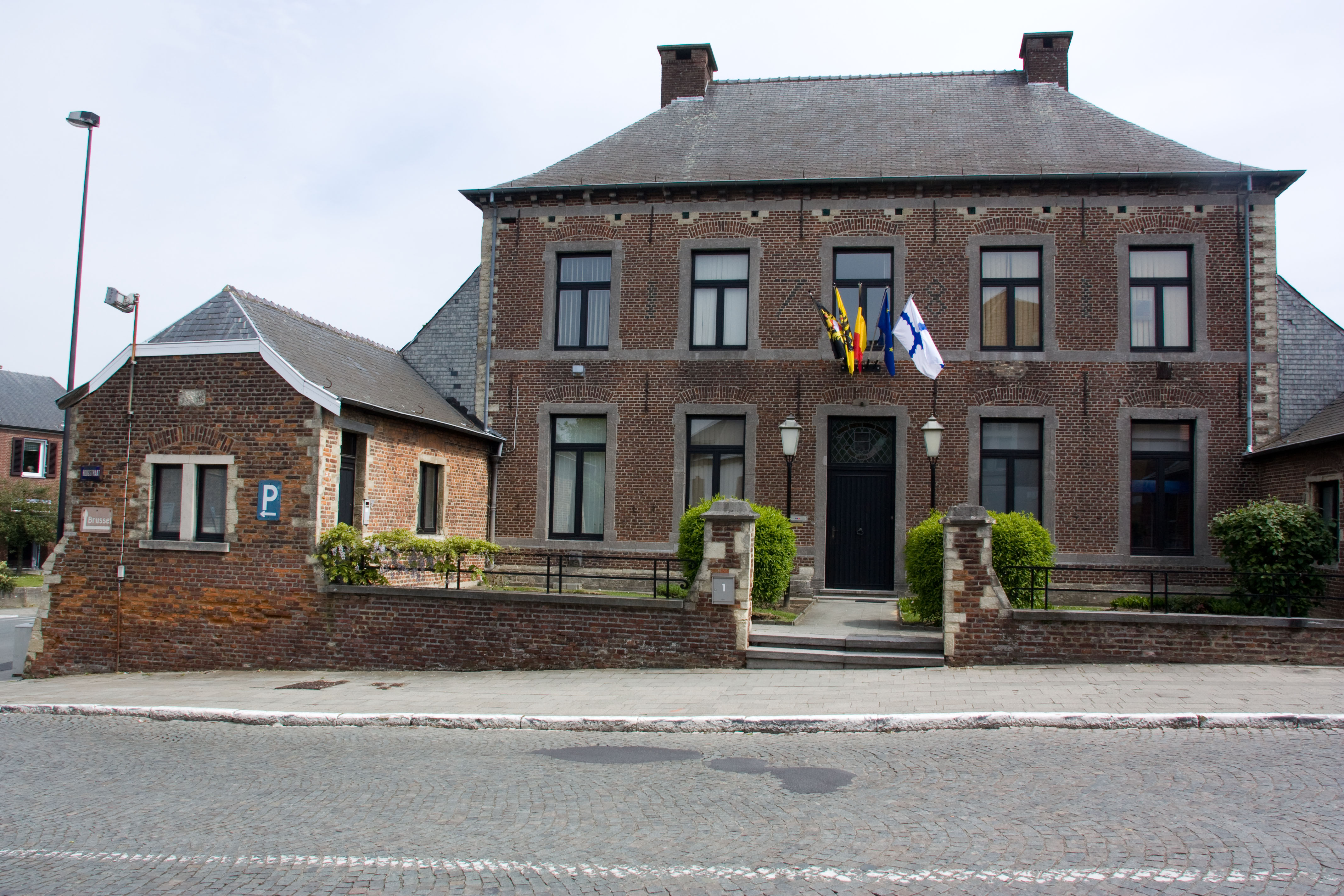 Hotel de ville de Beersel, Brabant flamand, Flandres, Belgique